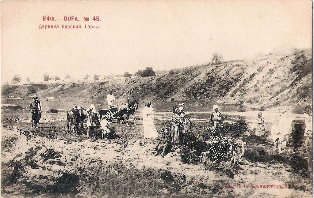 Уфа. Дореволюционные открытки с видами города